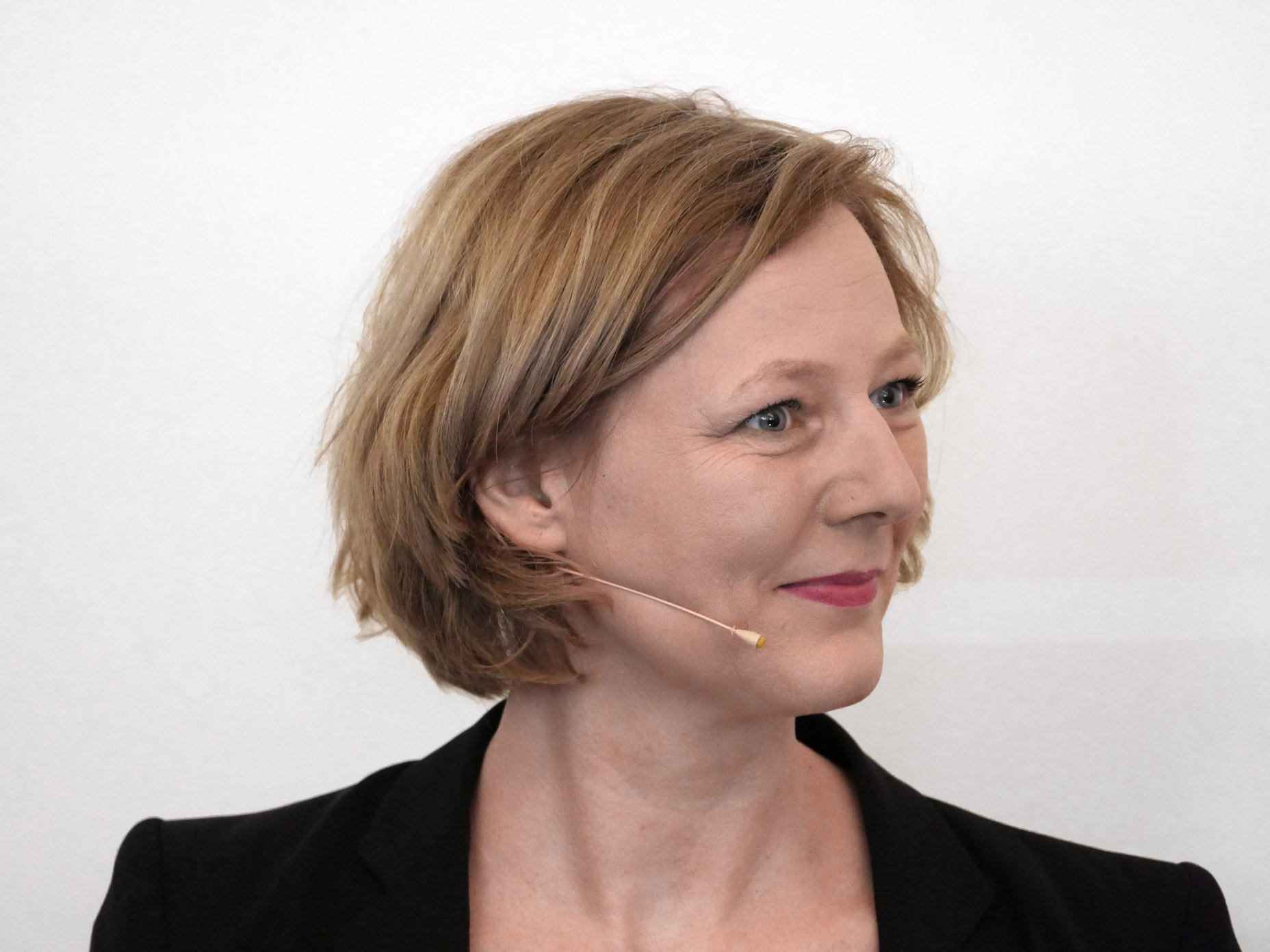 Gesche Joost (April 2017)